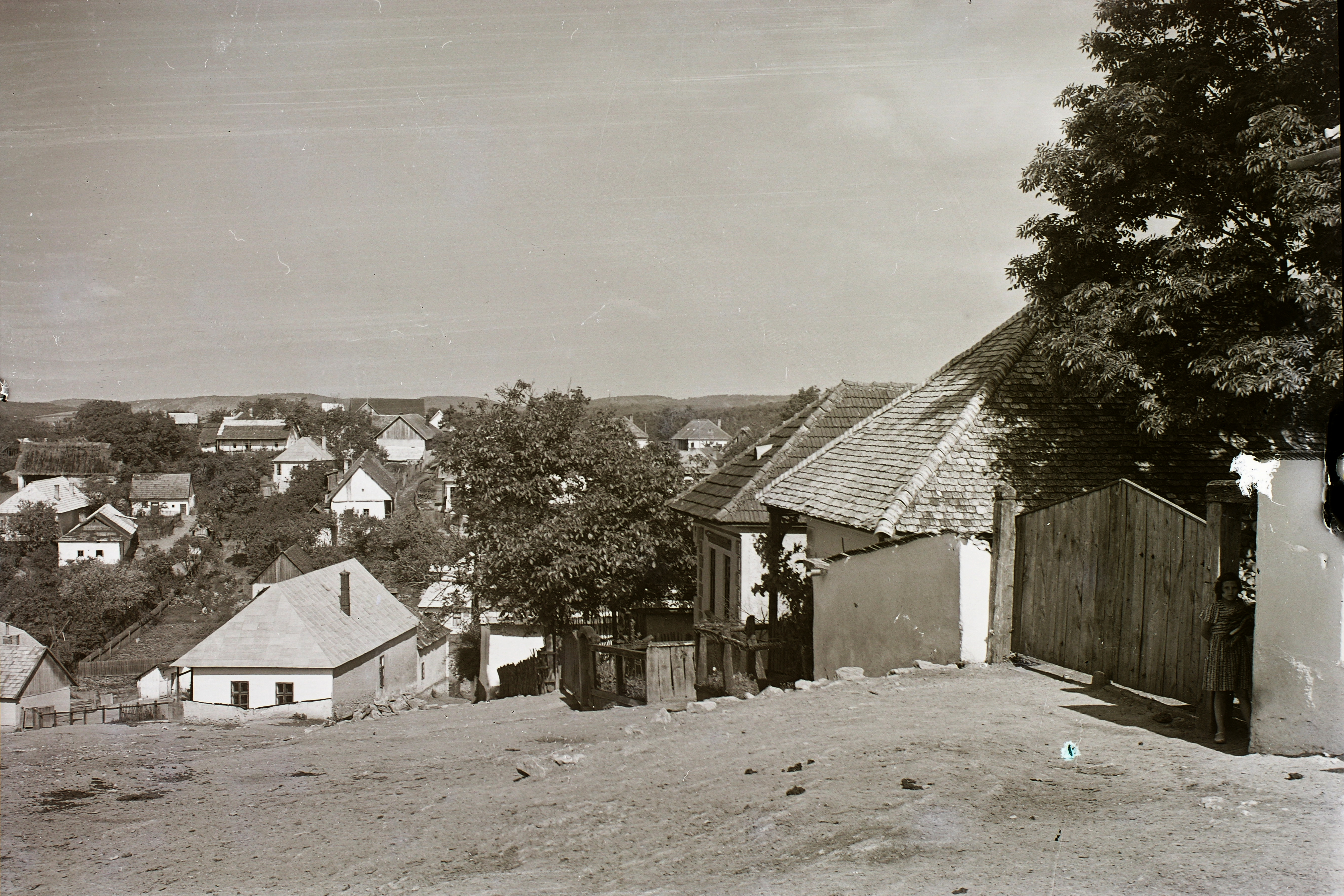 a község látképe a református templomtól. Location: Slovakia, Silica Title: a község látképe a református templomtól.